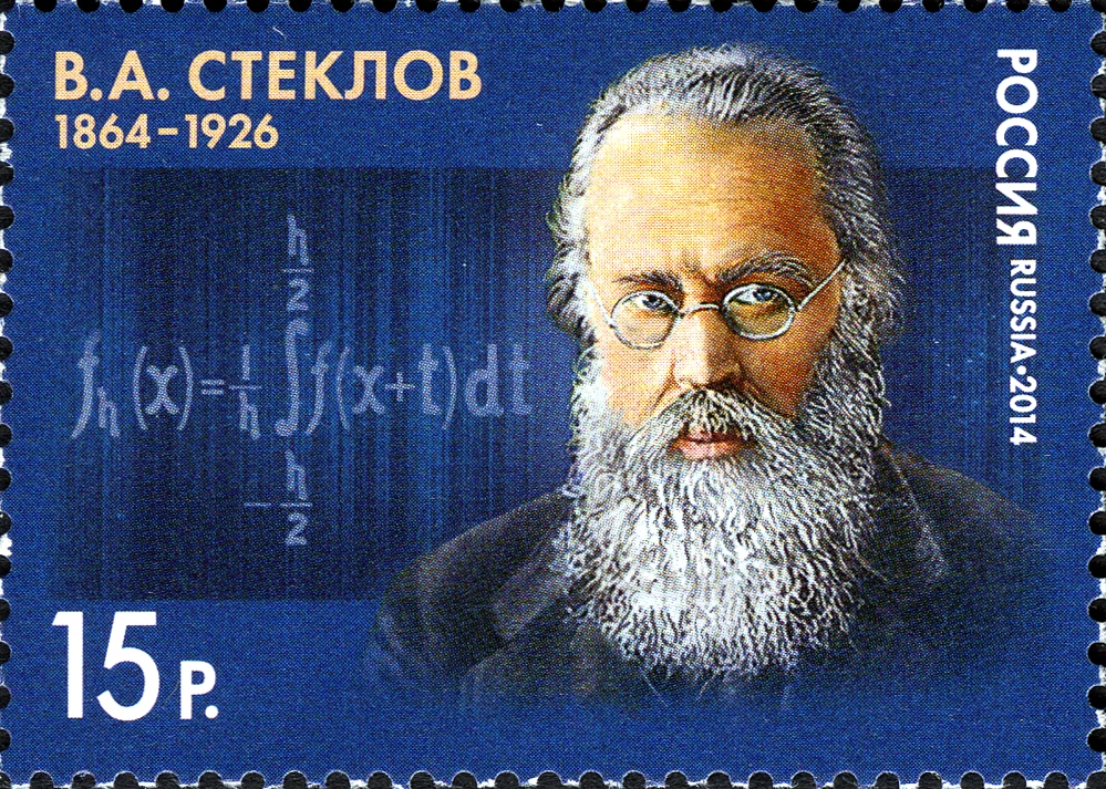 150 лет со дня рождения В.А.Стеклова (1864-1926), ученого